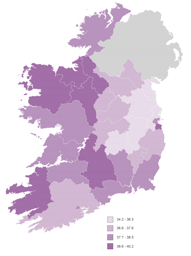 Средний возраст населения в Ирландии 2016